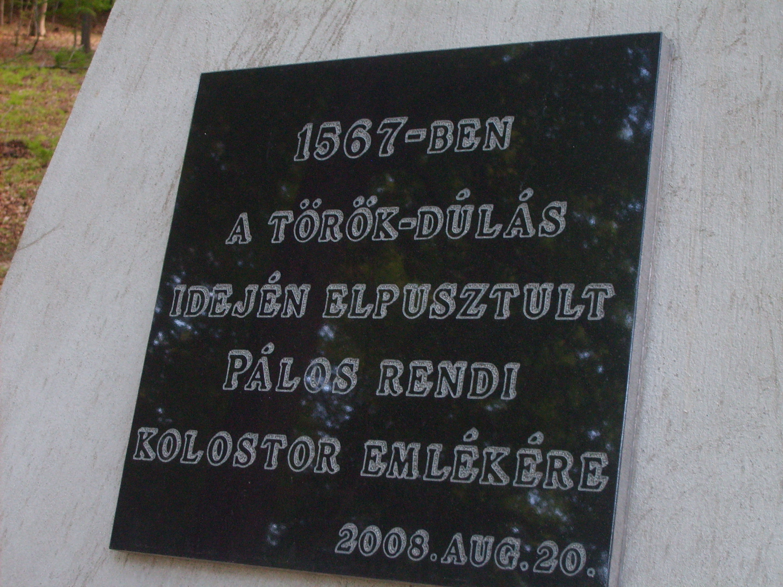 A Pálos-rendi kolostor helyén álló emlékmű szövege.